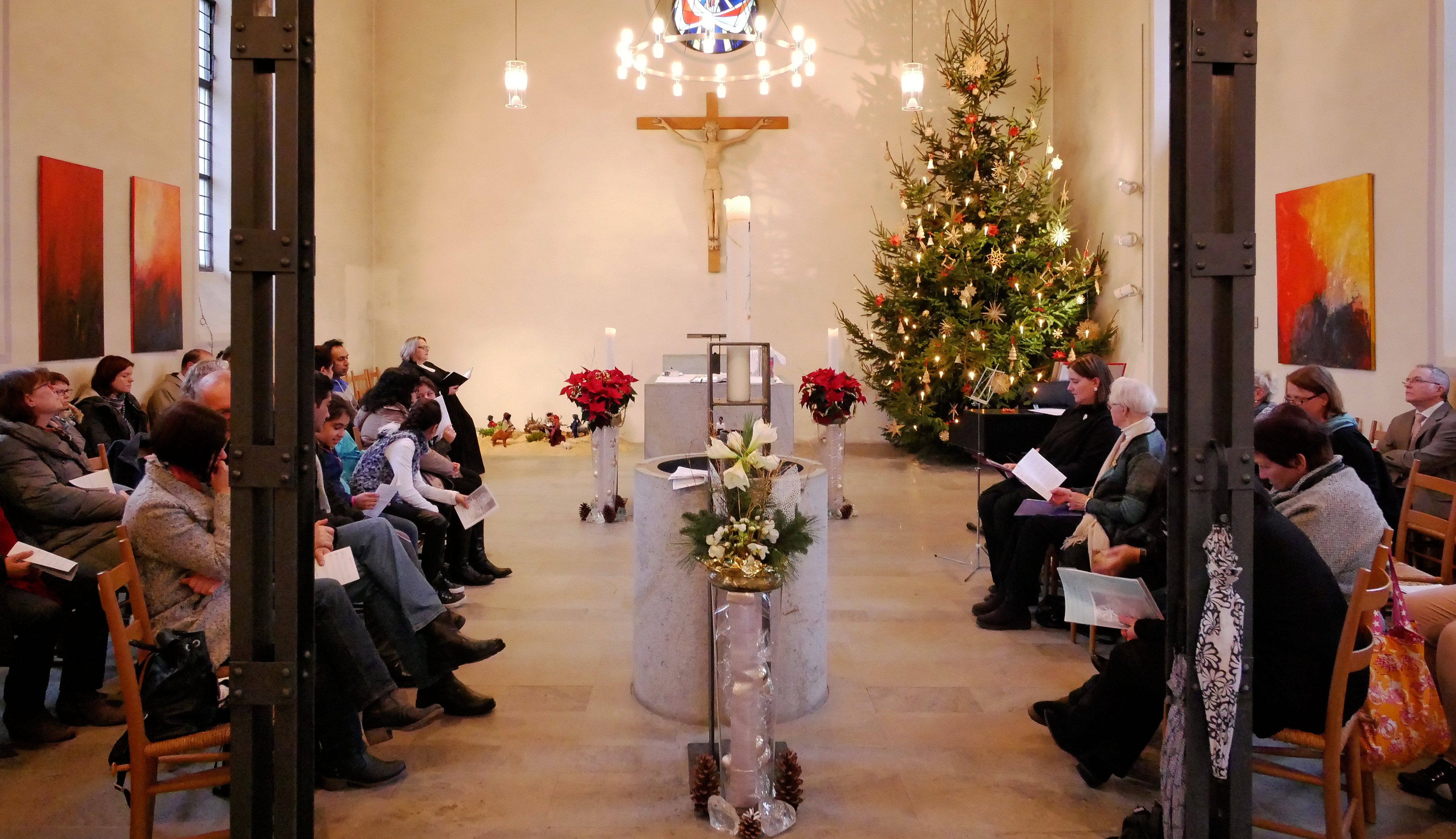 Evangelische Kirche Hermeskeil - Innenraum im Weihnachtsschmuck, Dezember 2016